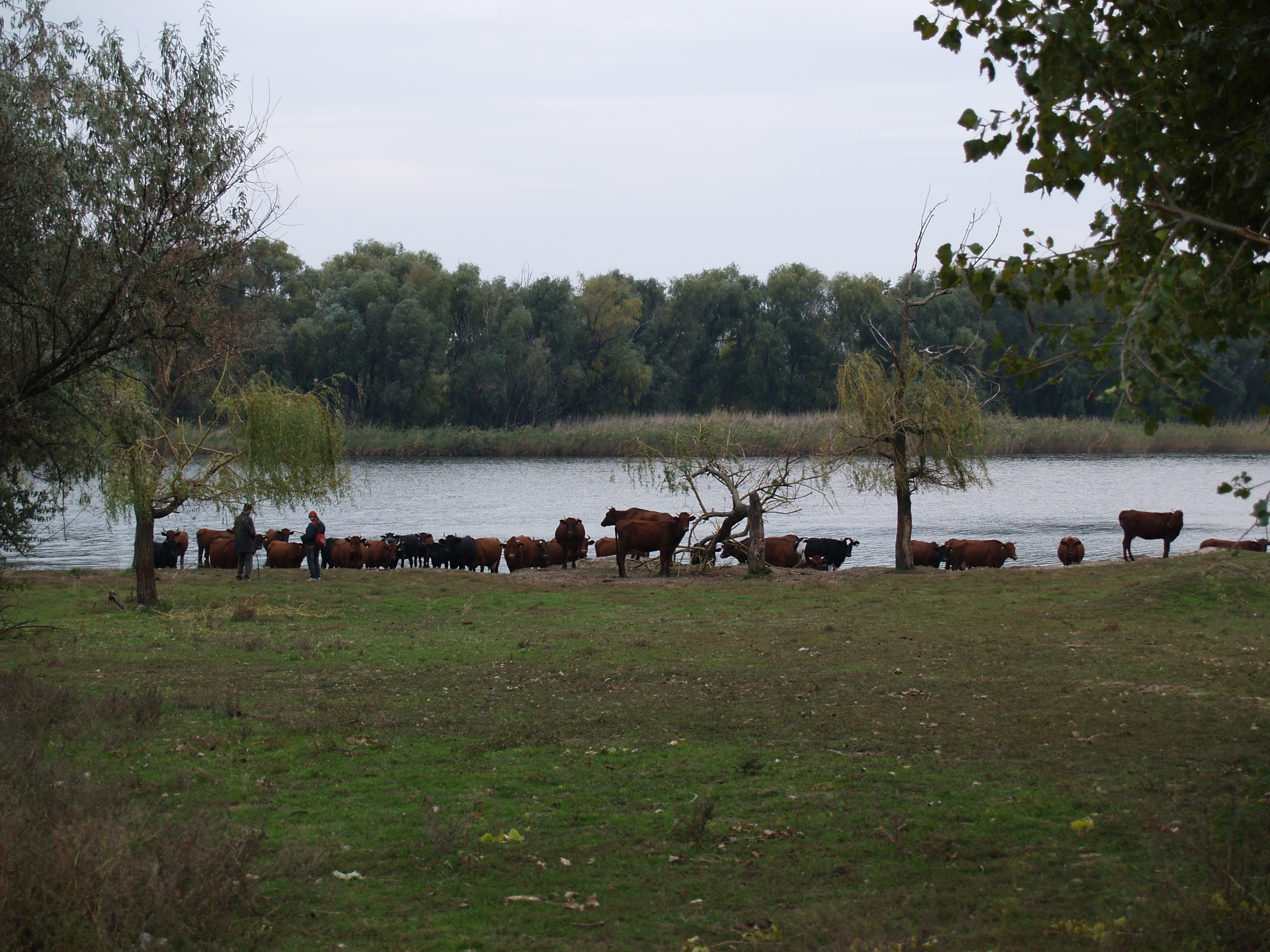 Коровы на водопое